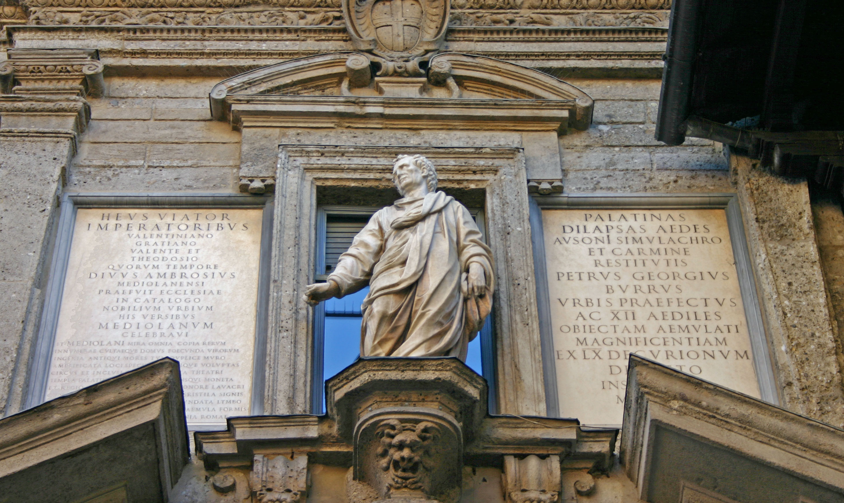 Ausonius Statu zu Mailand